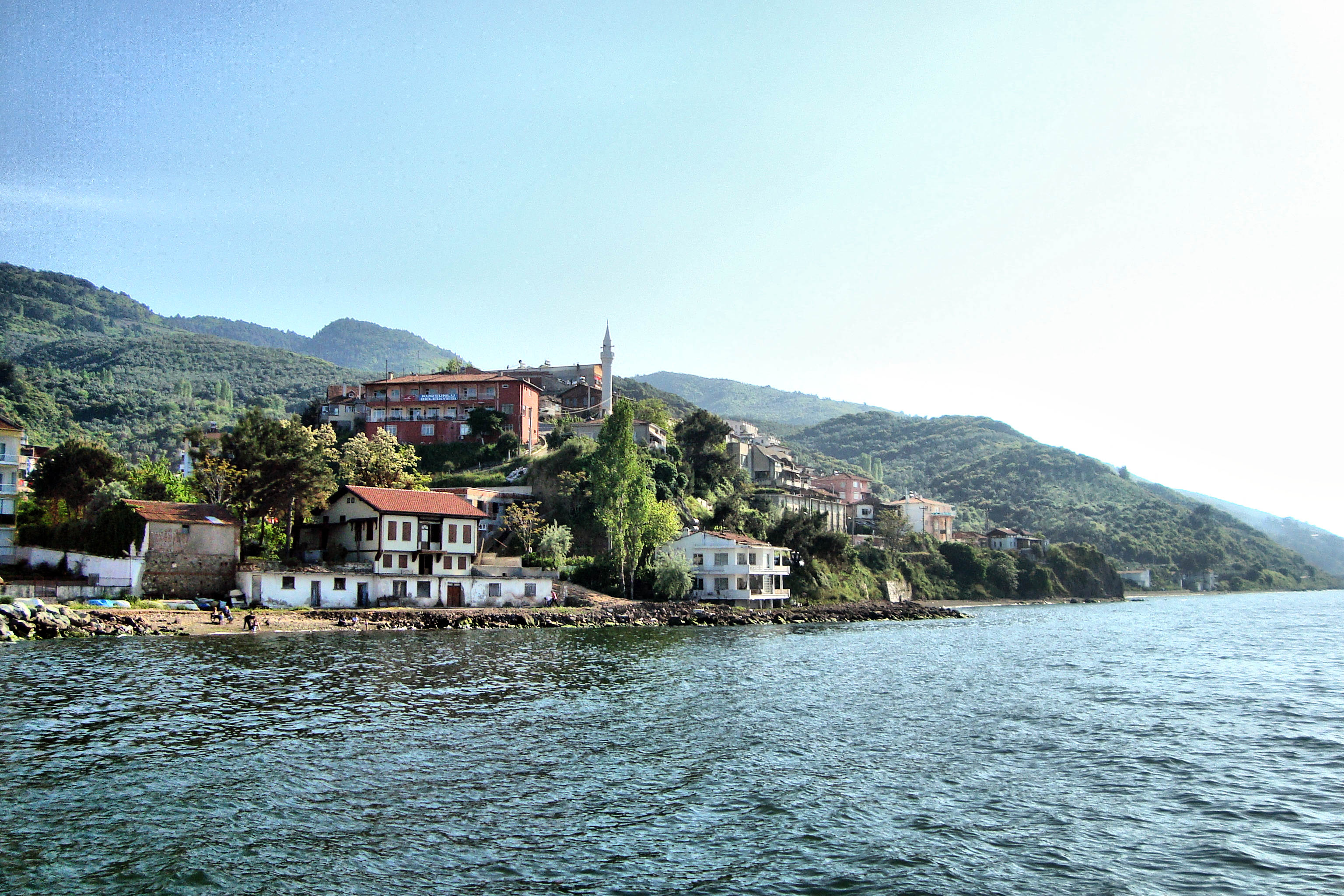 Kurşunlu-Bursa